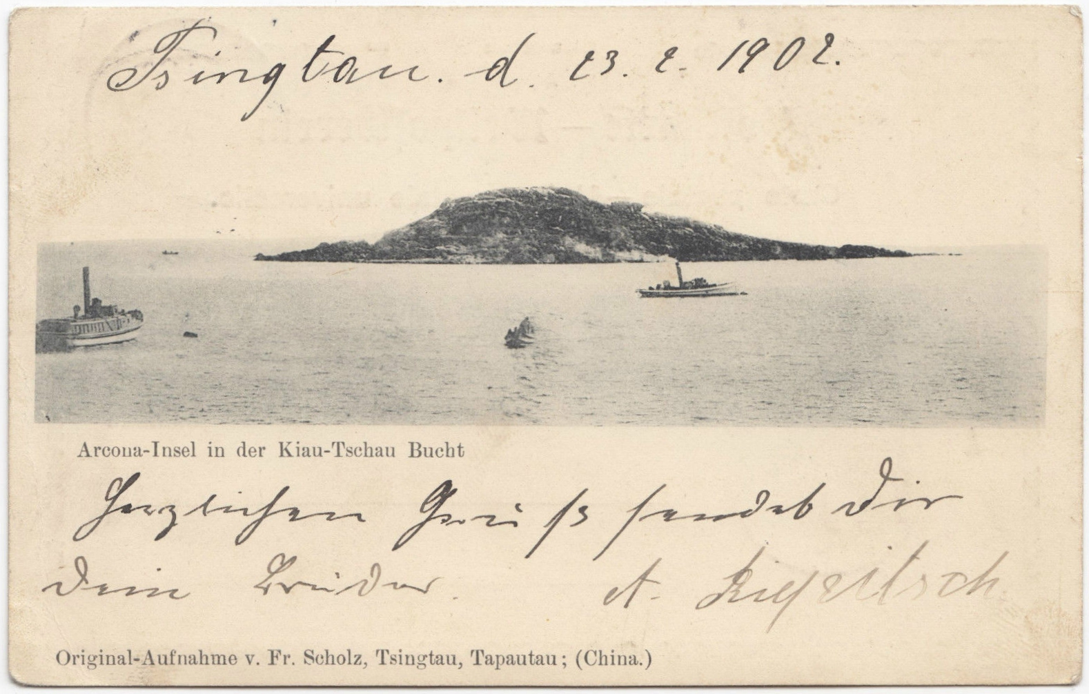 小青岛明信片，德租初期